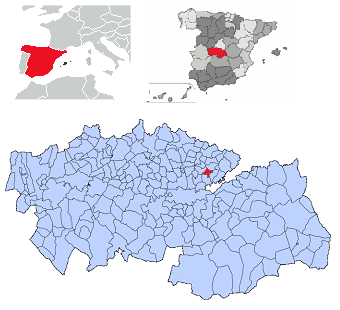 Cobeja en la provincia de Toledo